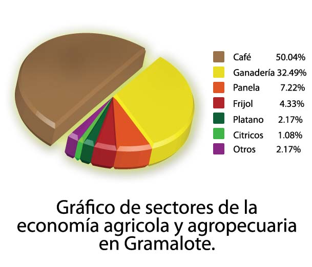 Gráfico dela producción economica en Gramalote, Norte de Santander